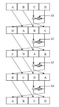 Funcionamento CAST-256 usando Feistel.